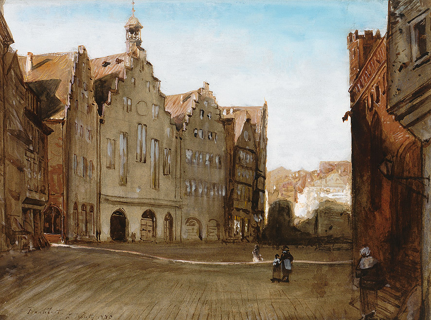 Frankfurt am Main, "Straßenbild und Römer", 1880. Gouache. 22,5 x 30,5 cm